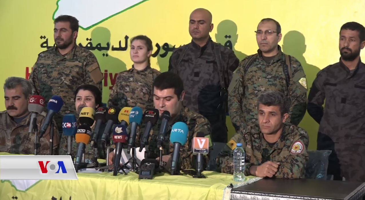 Conférences des Forces démocratiques syriennes, le 22 janvier 2018, après l'offensive turque à Afrine